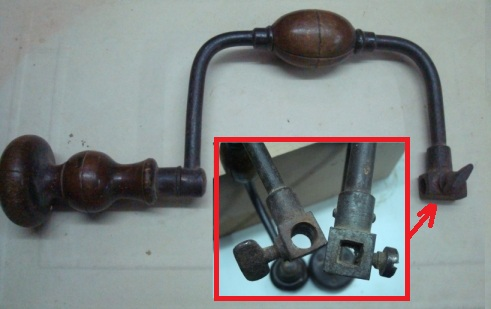 Vilebraquin à empreinte